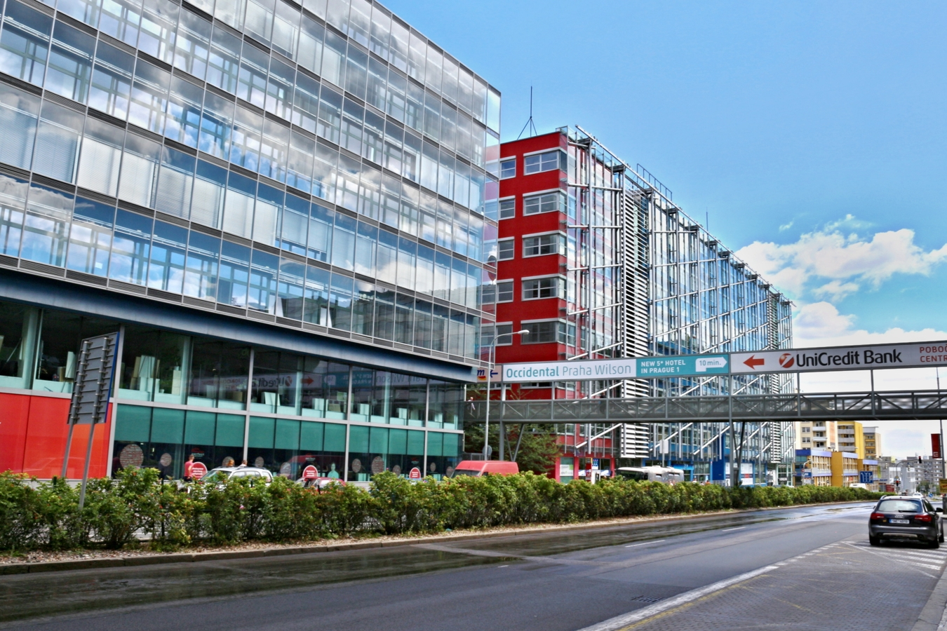 BB Centrum, budovy